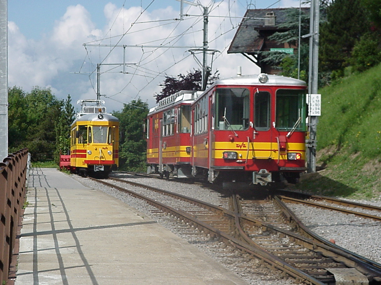 Bahnhof Gryon der Chemin de fer Bex-Villars-Bretaye